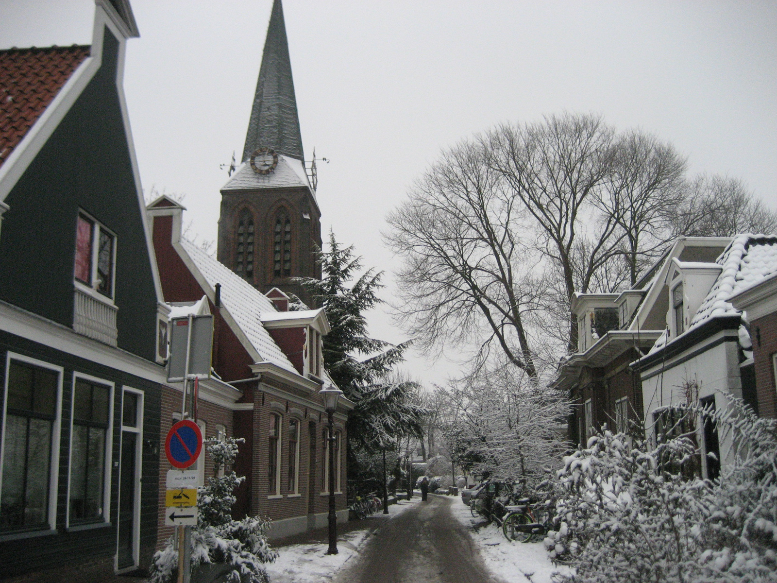 Nieuwendammerdijk, Amsterdam, North Holland, Netherlands